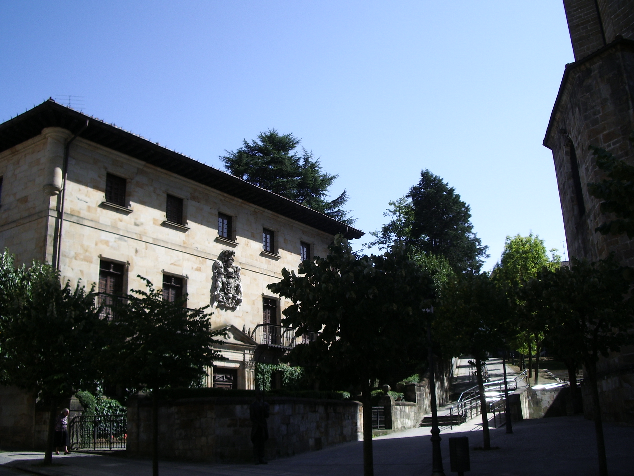 Palacio de Zearsolo en Elorrio